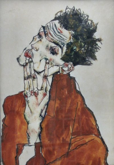 vanaf een poster bij het Haags Gemeentemuseum